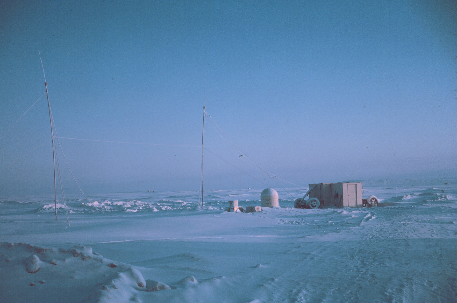 Nord,Grönland fotoğrafı Resim ID: geod0947, Geodesy Collection Yer: Nord, Greenland, Denmark Fotoğrafın Yılı: 1967 Fotoğrafı çeken/Fotoğraf sahibi: Roy W. Anderson, NOAA, NGS